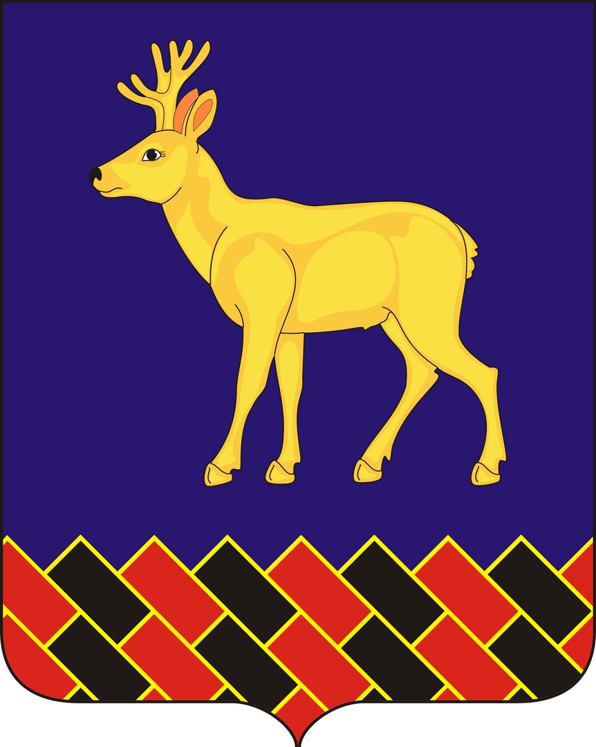 ГЕРБ МИШКИНСКОГО РАЙОНА КУРГАНСКОЙ ОБЛАСТИ